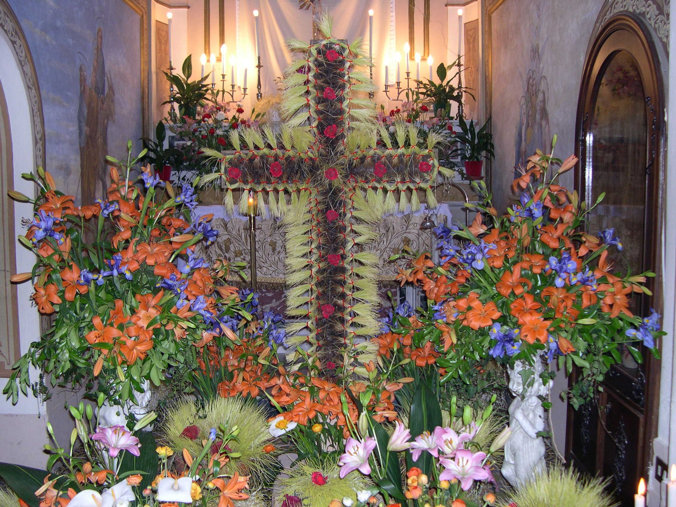 Easter in Conca dei Marini